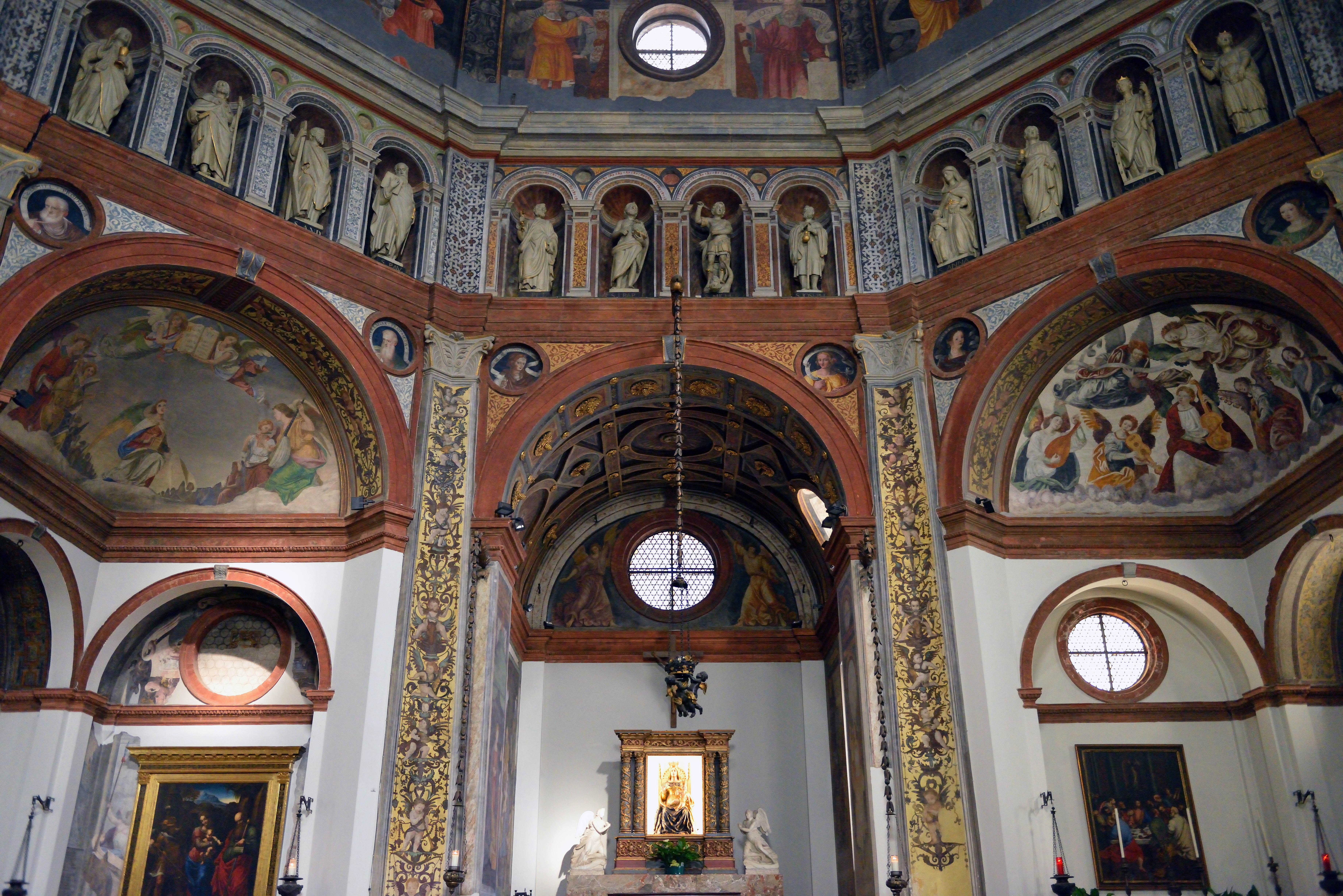 Santuario di Santa Maria di Piazza This is a photo of a monument which is part of cultural heritage of Italy.